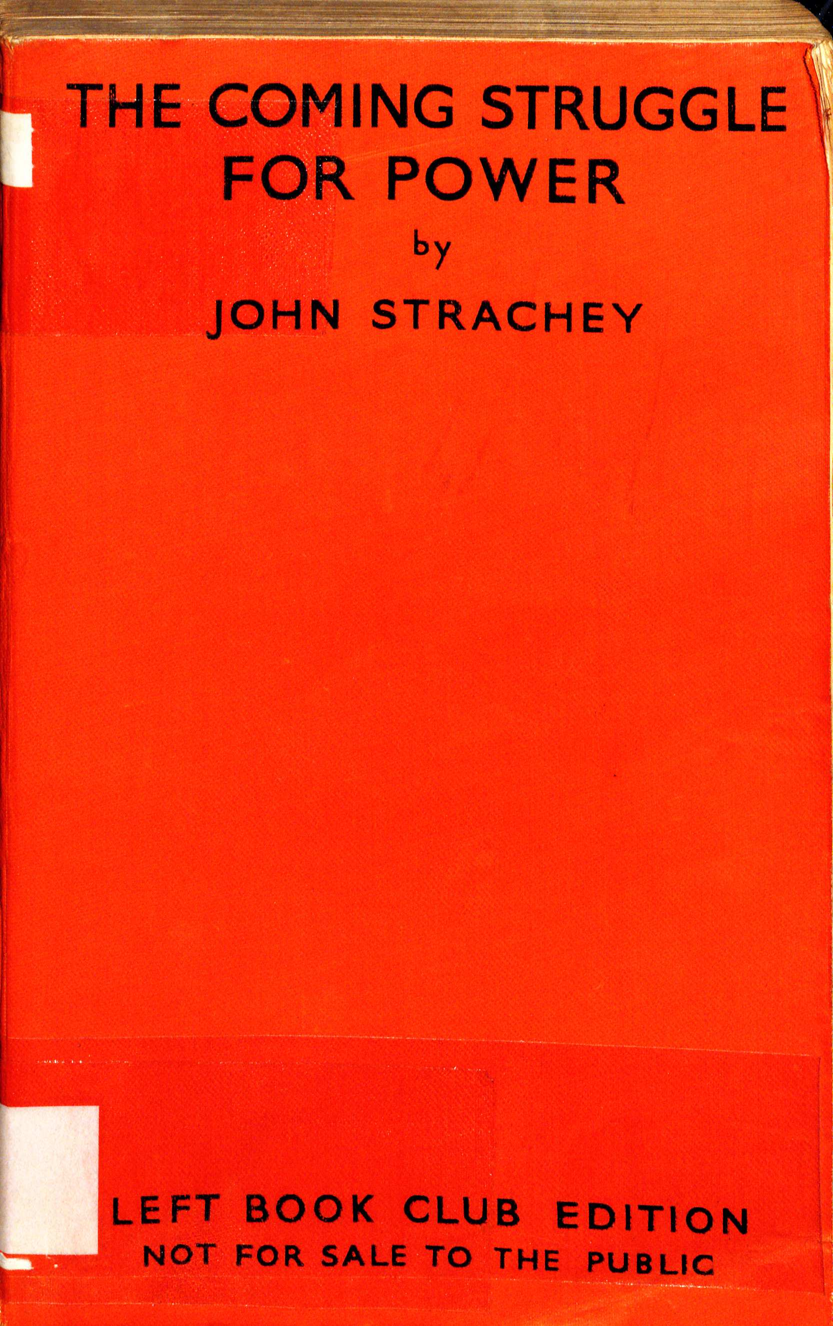 John Strachey The Coming Struggle for Power 1937, zuerst 1932